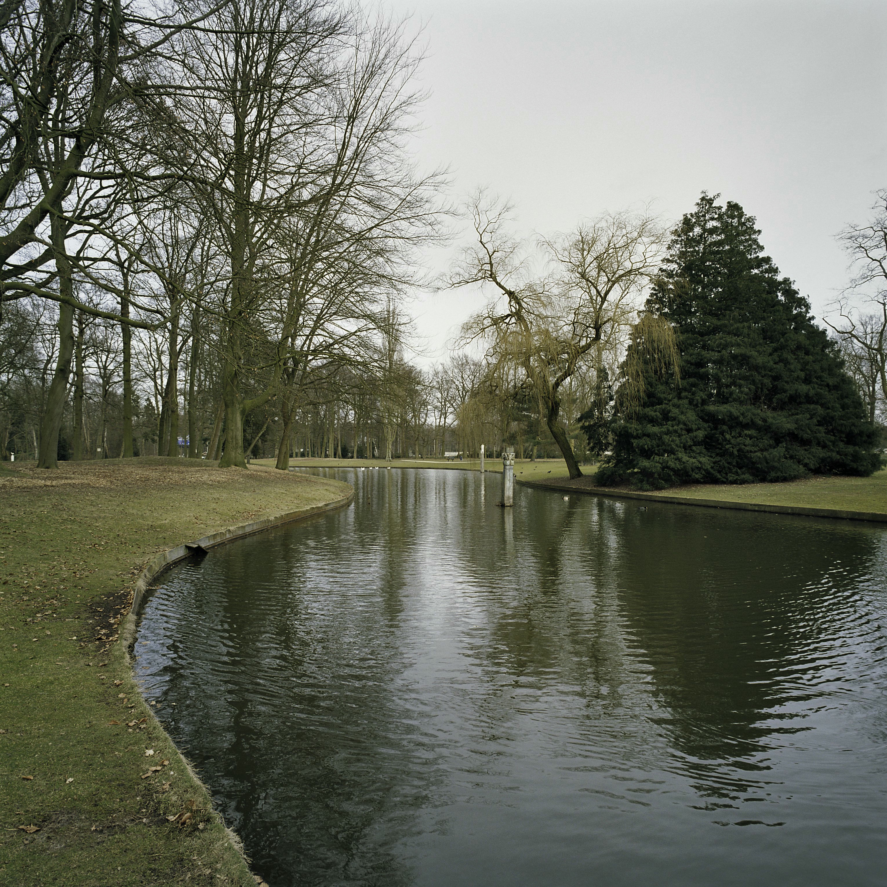 Landhuis Leeuwenstein: Parkaanleg